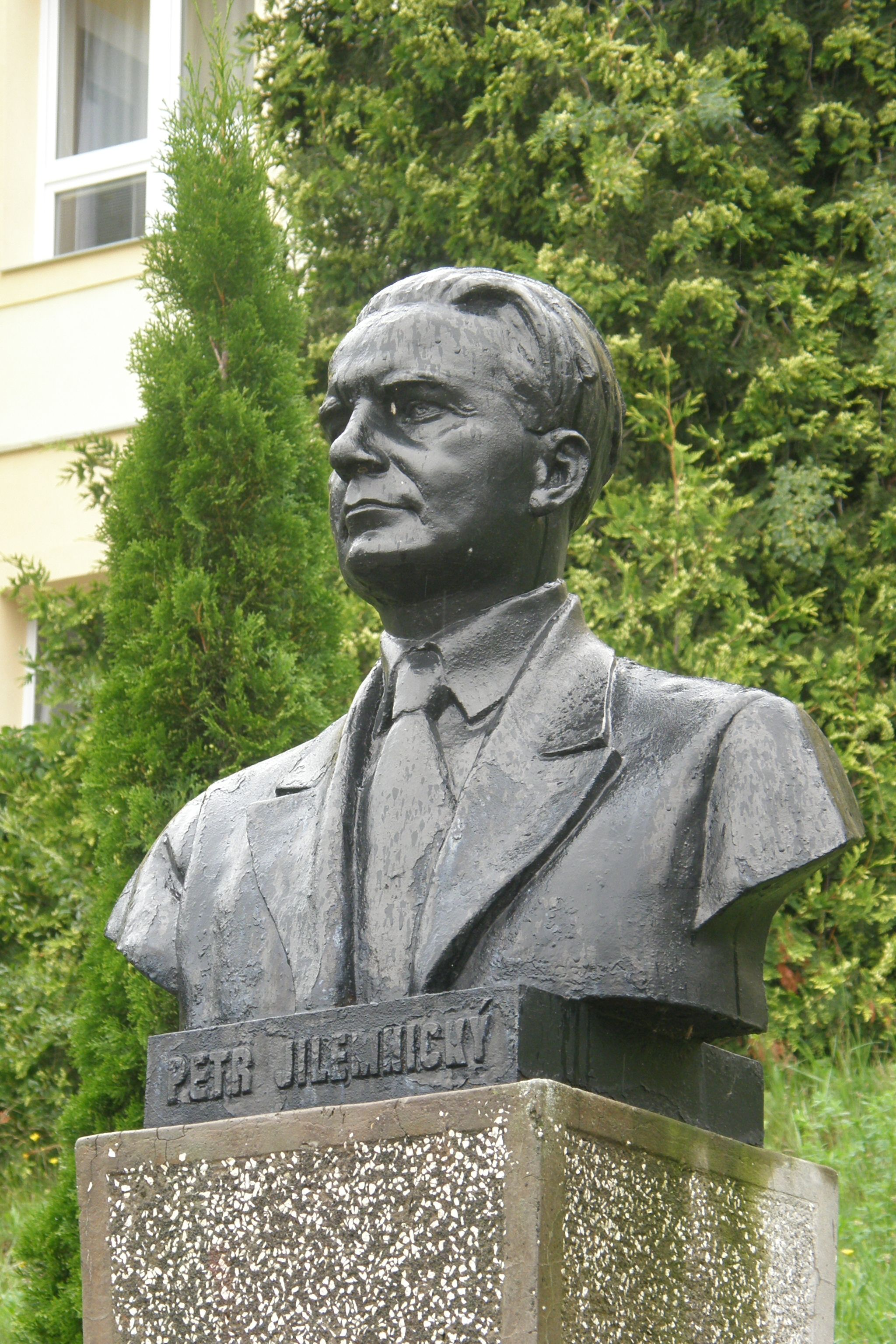 Busta Petera Jilemnického v Adamov u základní školy